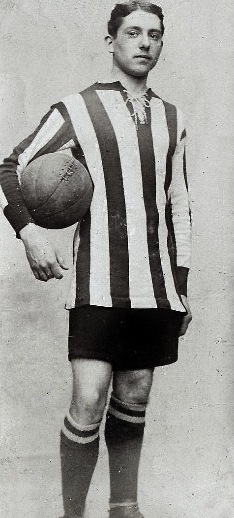 RC Roubaix